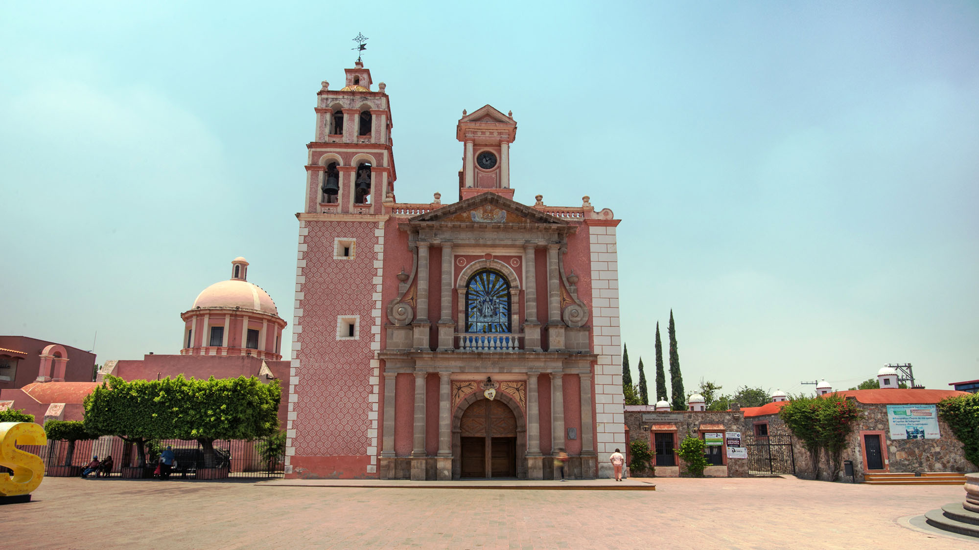 Tequisquiapan